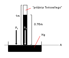 Schemat opisujący doświadczenie Torricellego